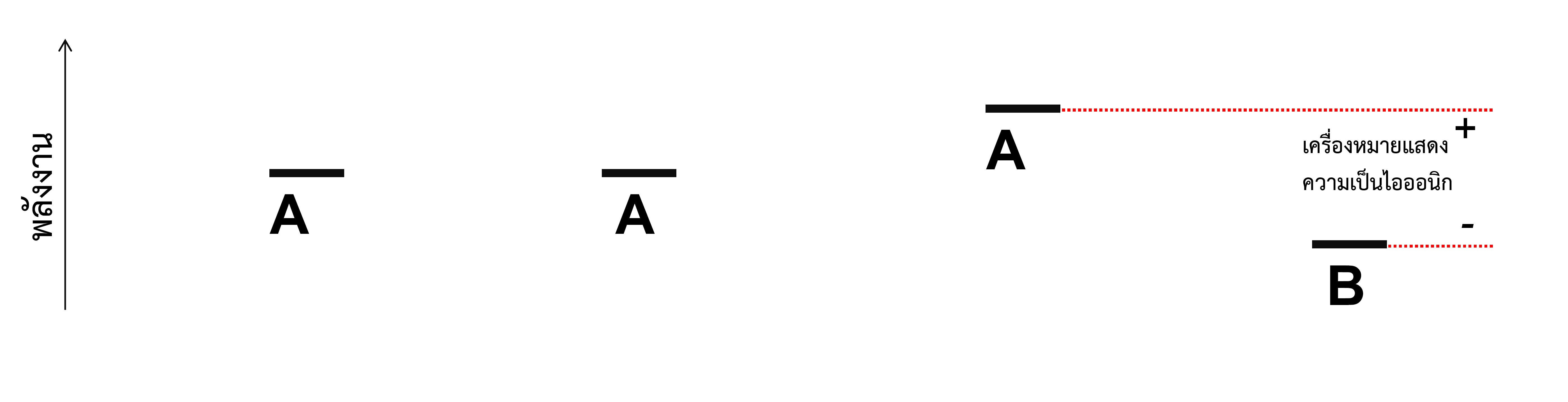 Allen's EN for Oxidation State Definition